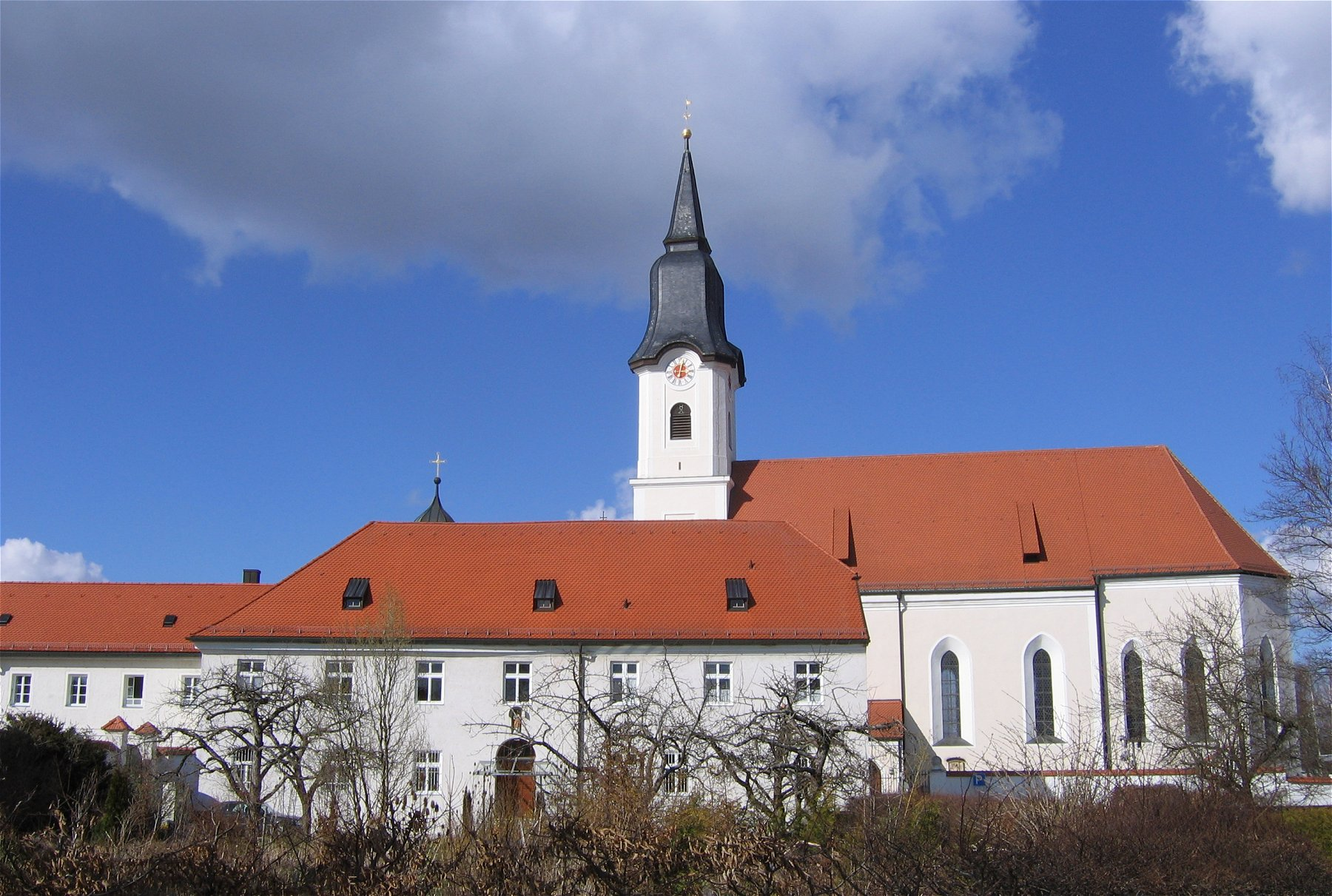 Berg am Starnberger See, Aufkirchen, Mariä Himmelfahrt